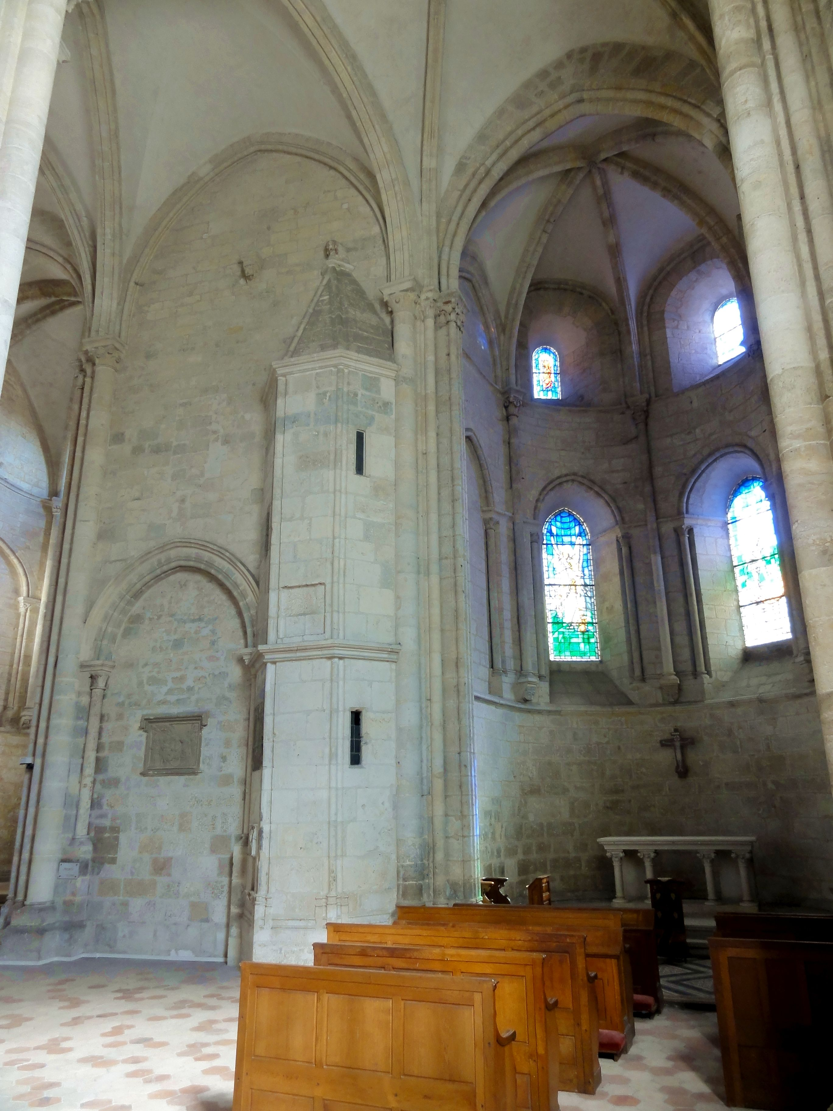 Collatéral sud, vue vers l'est.